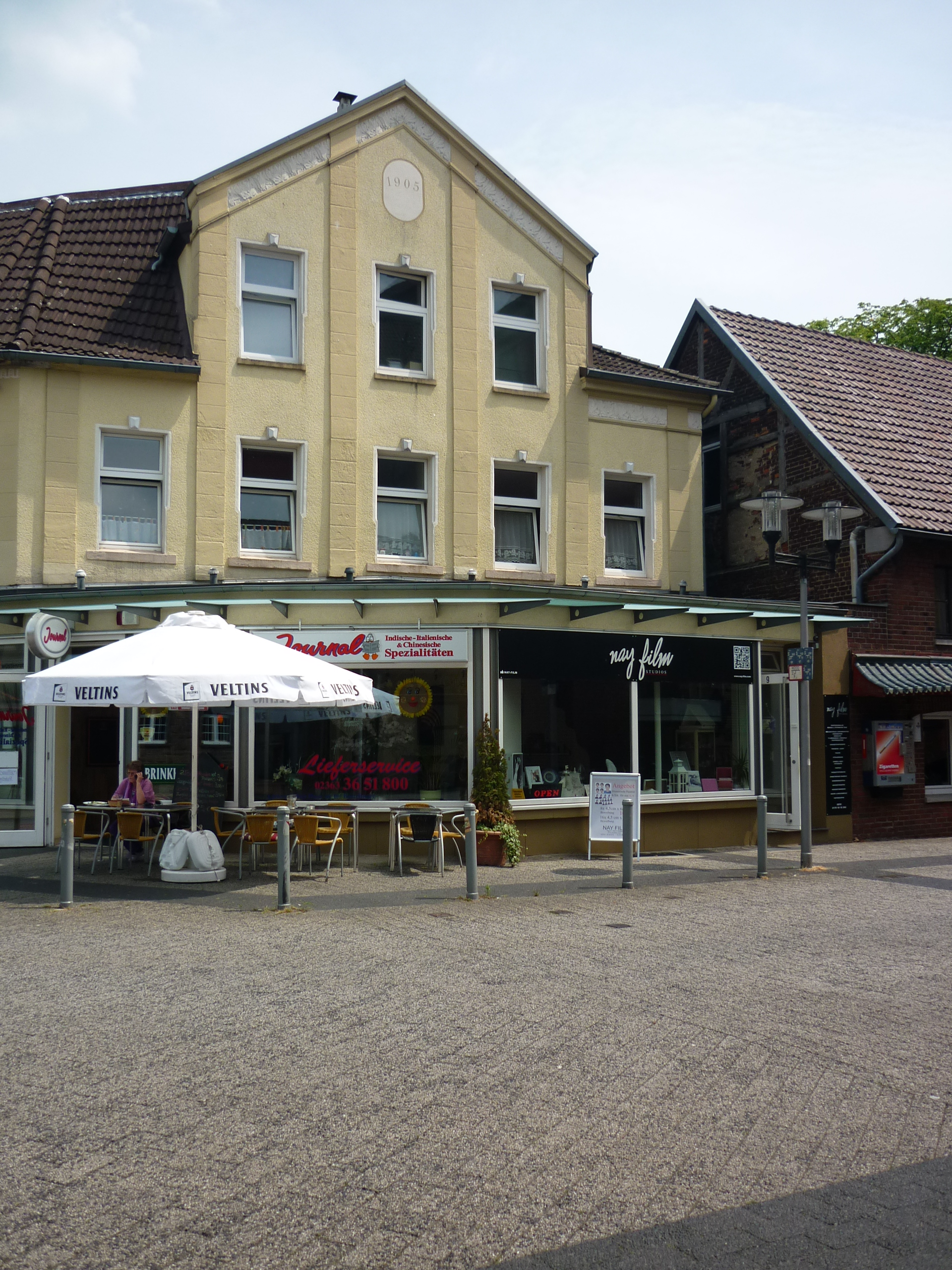 Stolpersteinlage Datteln Tigg 9